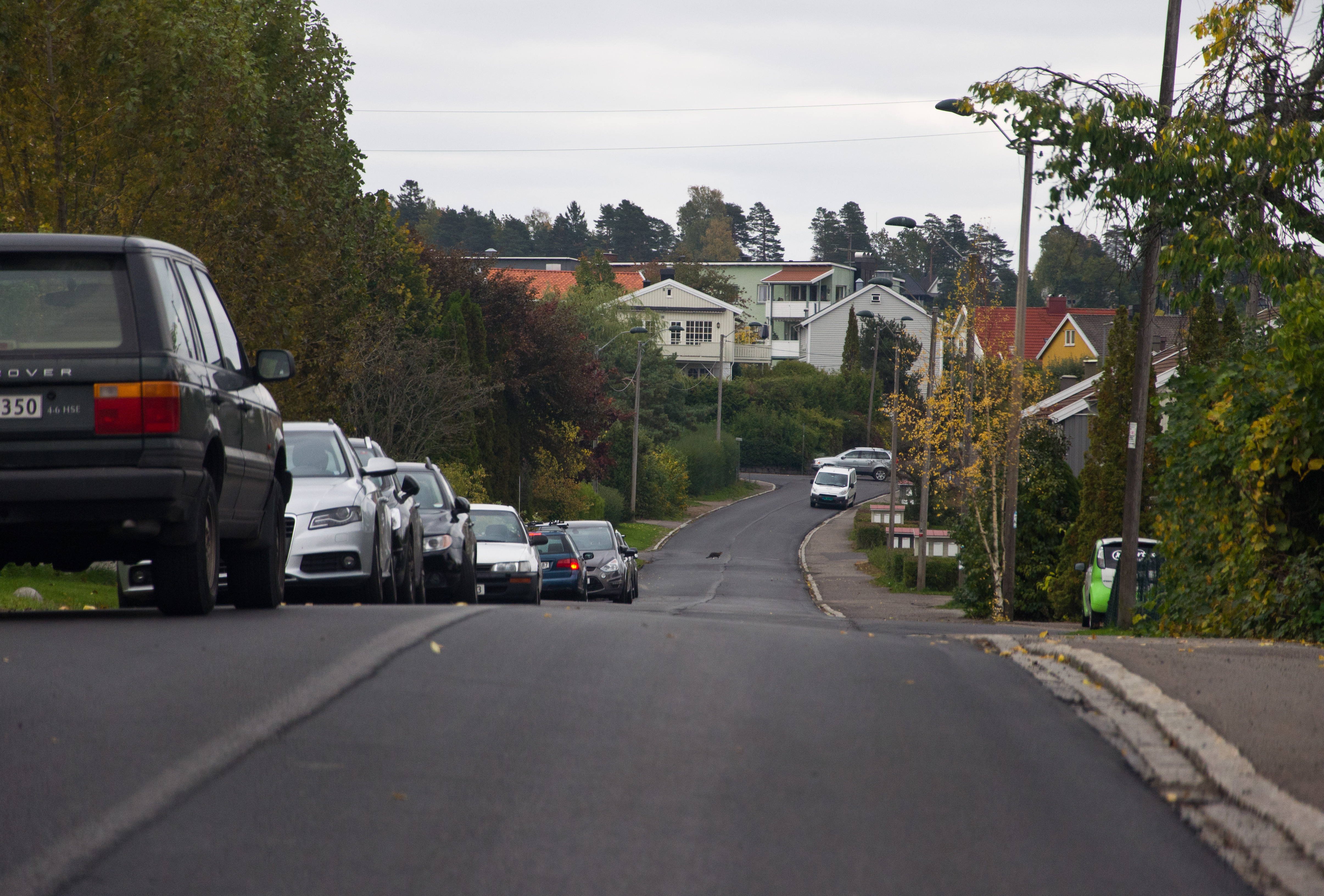 Vestfolds fylkesvei 462 Gyldenløves gate i Tønsberg